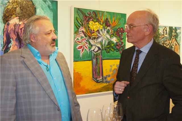 Vernissage "Matthias Laurenz Gräff und Helmuth Gräff. Zwischen den Welten - Zwischen den Generationen", Galerie Daliko, Krems an der Donau Foto Kooperation mit der Galerie DALIKO